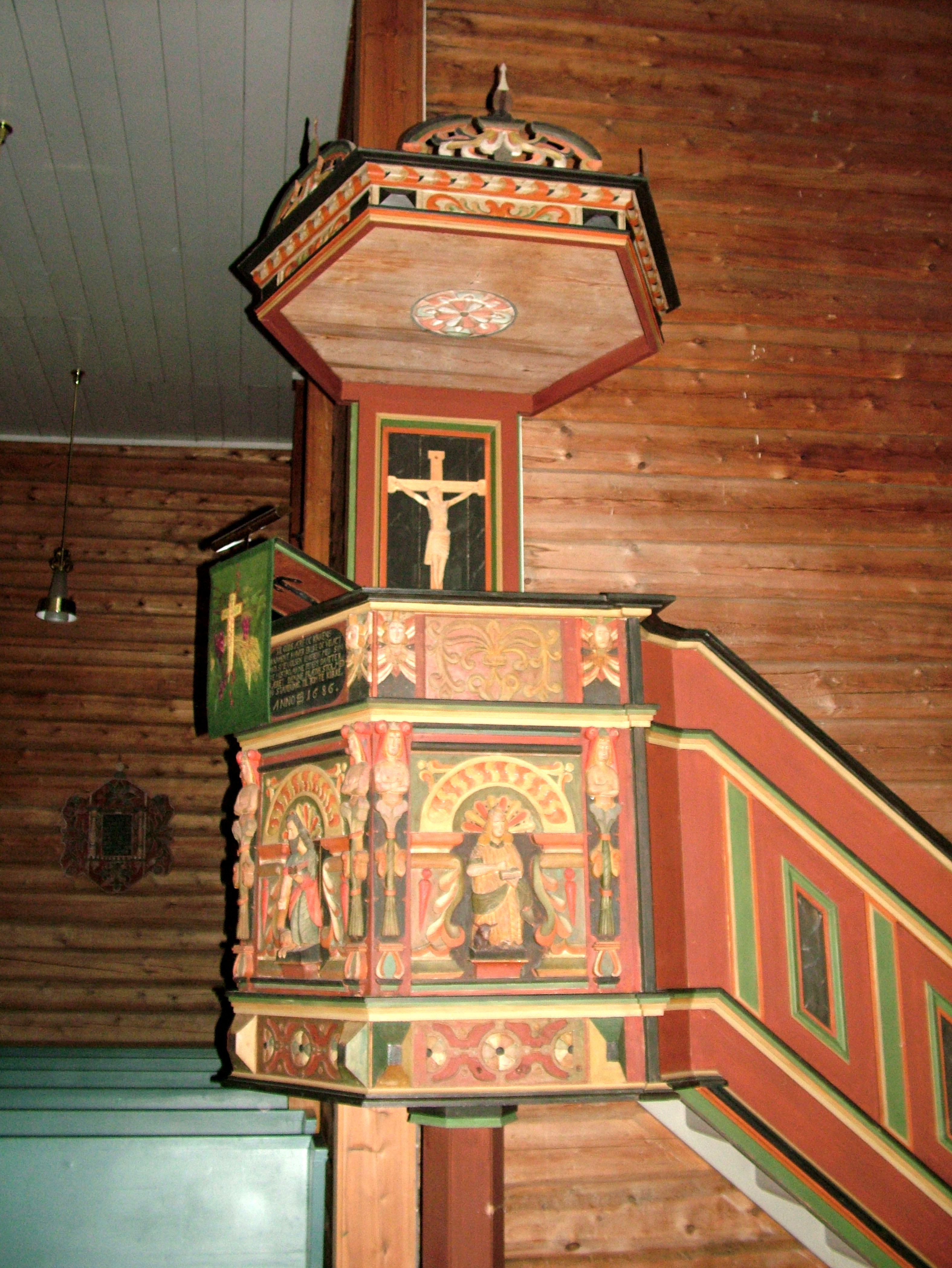 Prekestolen i Vallset kirke er fra 1686 og antagelig laget av Johannes Larsen Skraastad, Vang.